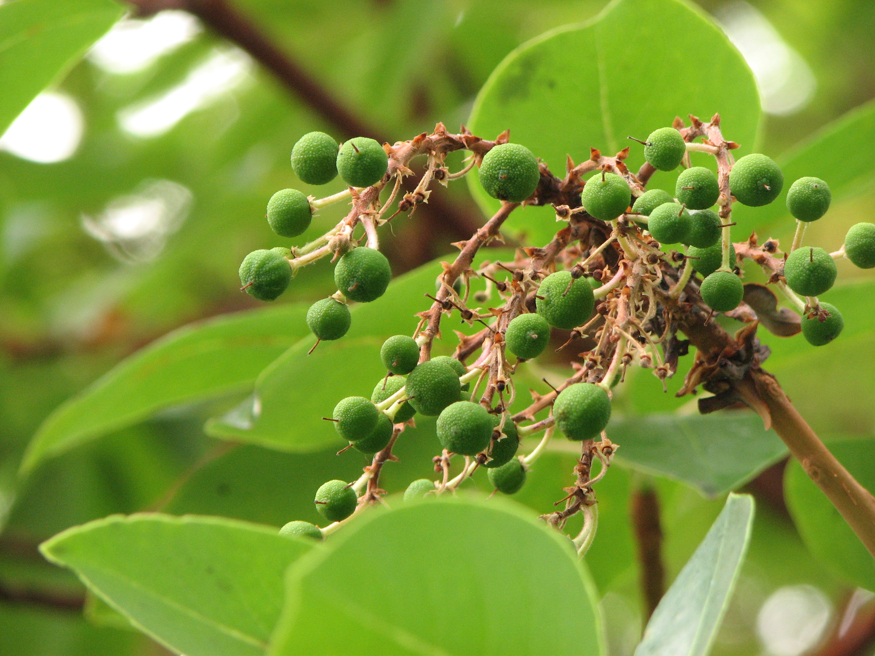 Arbutus menziesii immature fruit.